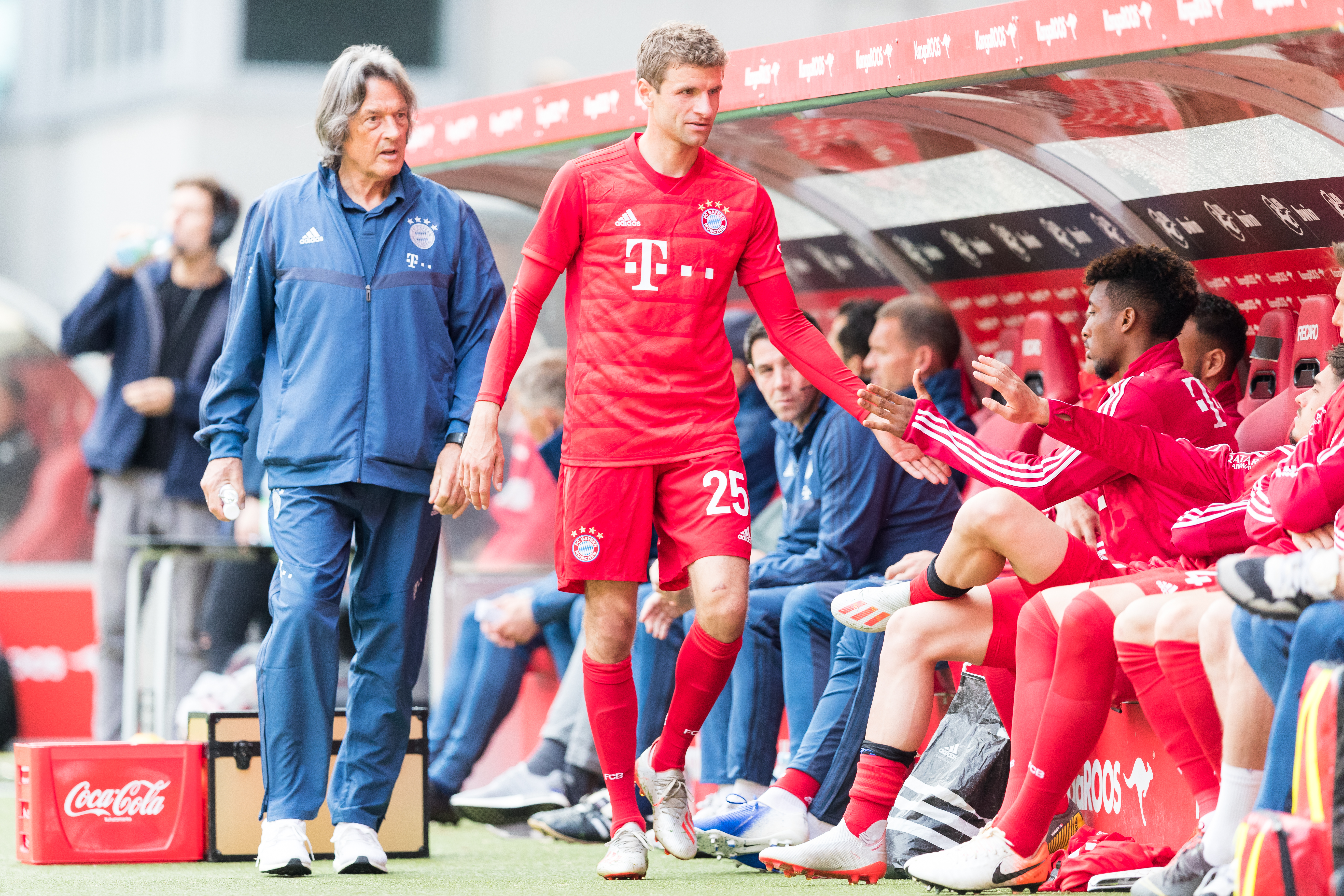 during 1.FC Kaiserslautern vs FC Bayern München at Fritz-Walter-Stadion, Kaiserslautern, Rheinland-Pfalz, Germany on 2019-05-27, Photo: Sven Mandel